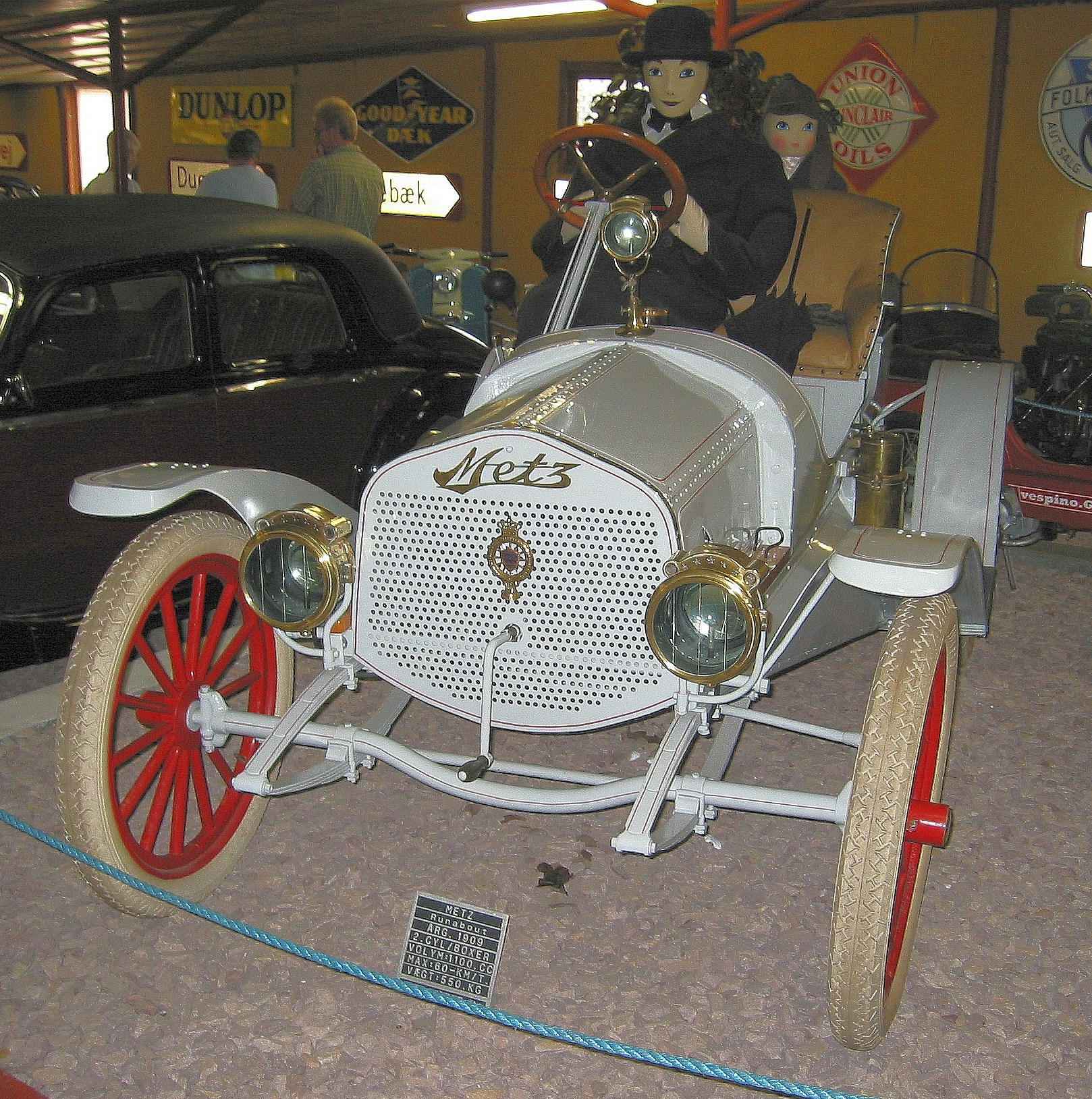 Metz Two Runabout von 1909 im Bornholm Automobilmuseum Aakirkeby